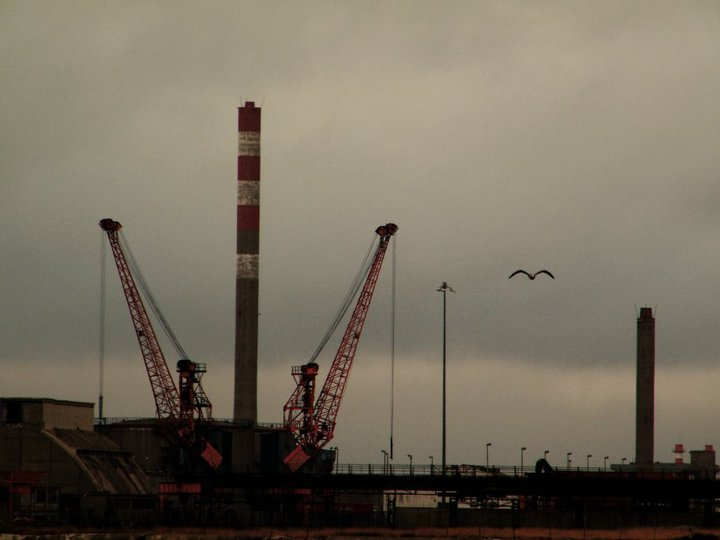 Unidade fabril da C.U.F do Barreiro, fotografia tirada da avenida da praia